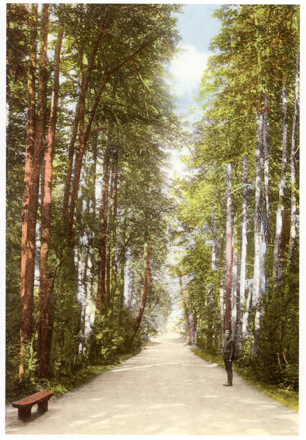 Царицынский парк в начале XX века. Открытка